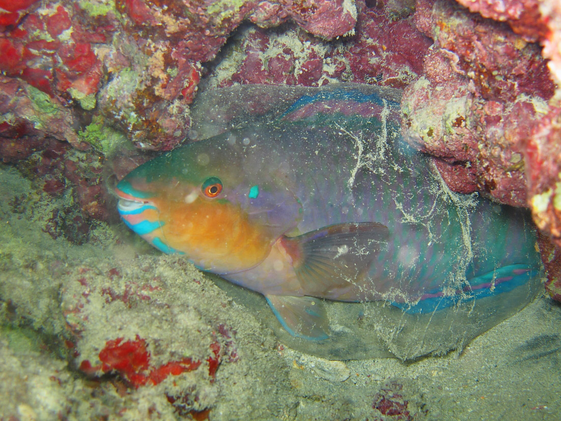 Budião Banana dormindo em sua bolha de muco. Acredita-se que esta bolha de muco evite que o odor do peixe atraia de predadores ou ainda que evitando ataque de parasitas como um "mosqueteiro".